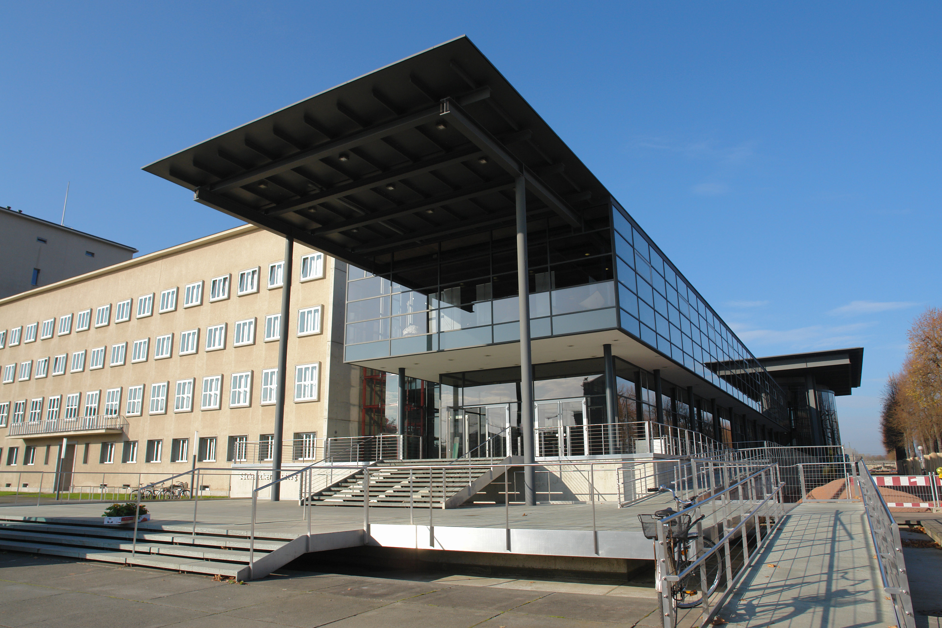 Sächsischer Landtag